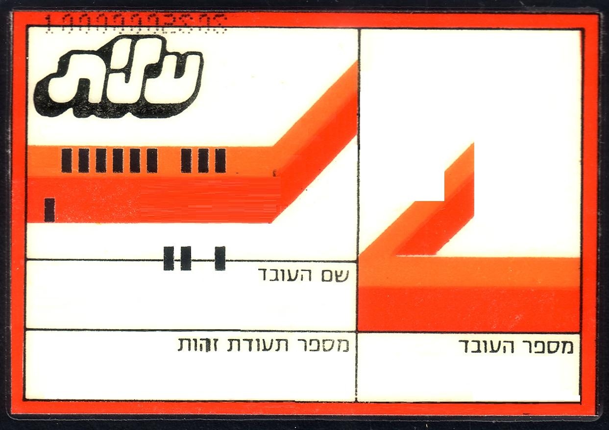 חברת עלית, תג עובד, כרטיס מנוקב